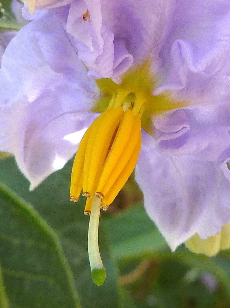 Solanum bonariense (Granadilla) : Detalle del aparato reproductor - Ornamental, Avenida del Calvario, Albatera (Alicante, España).